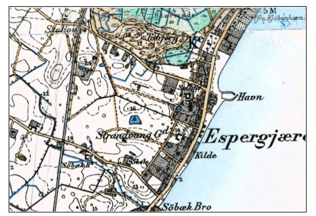 Espergærde 1898